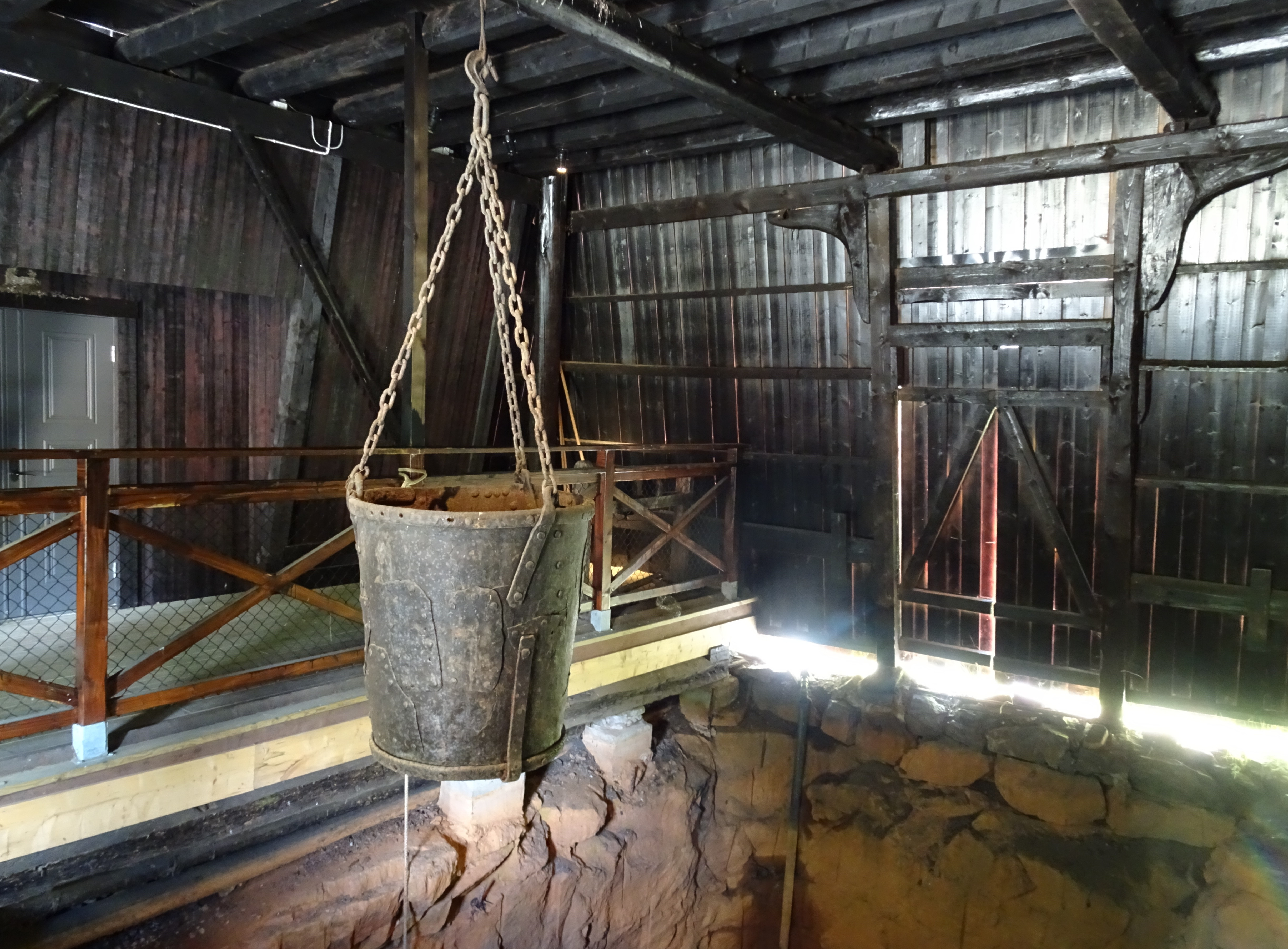 Skottvågns gruva